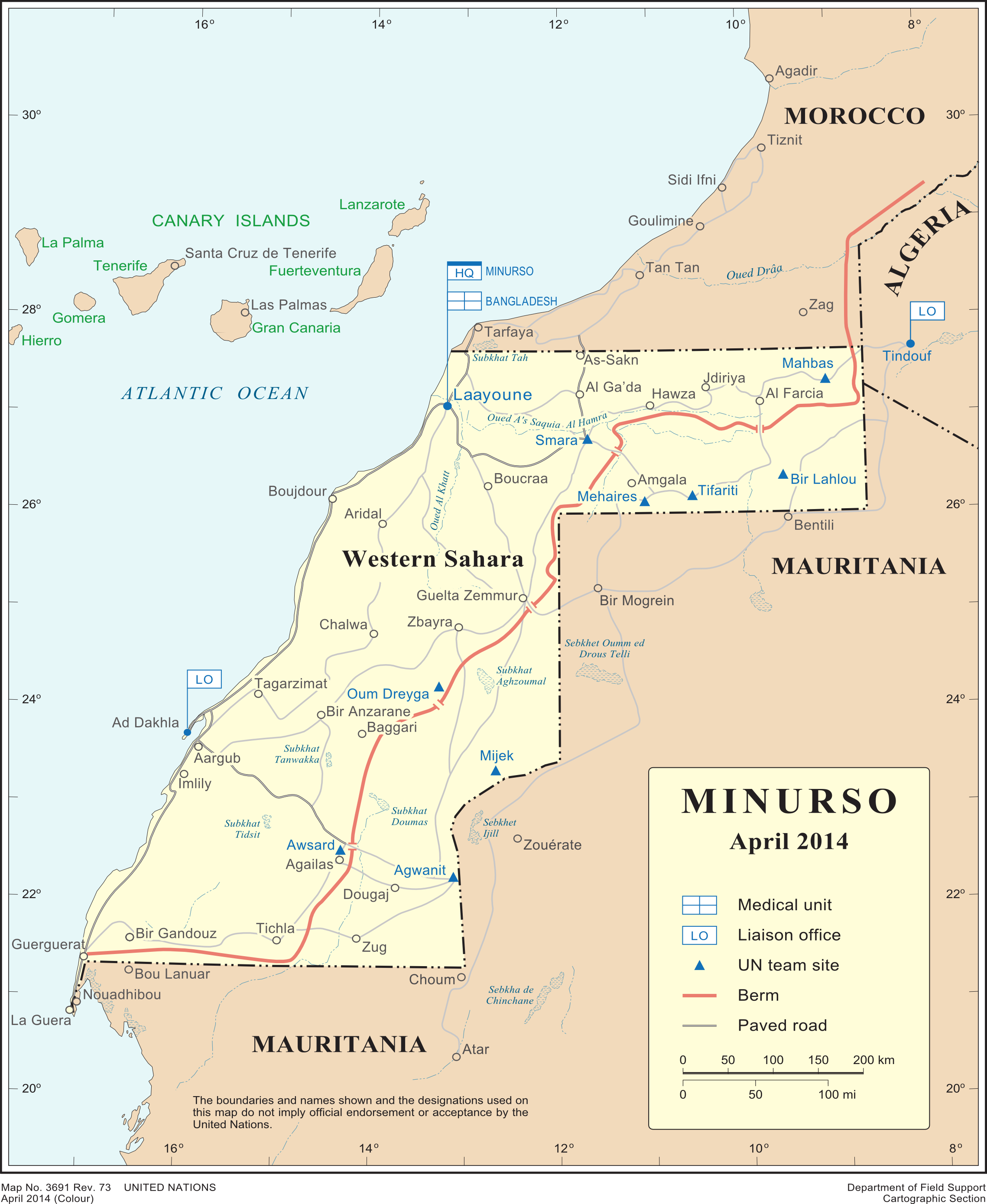 Déploiement de la Minurso au Sahara occidental